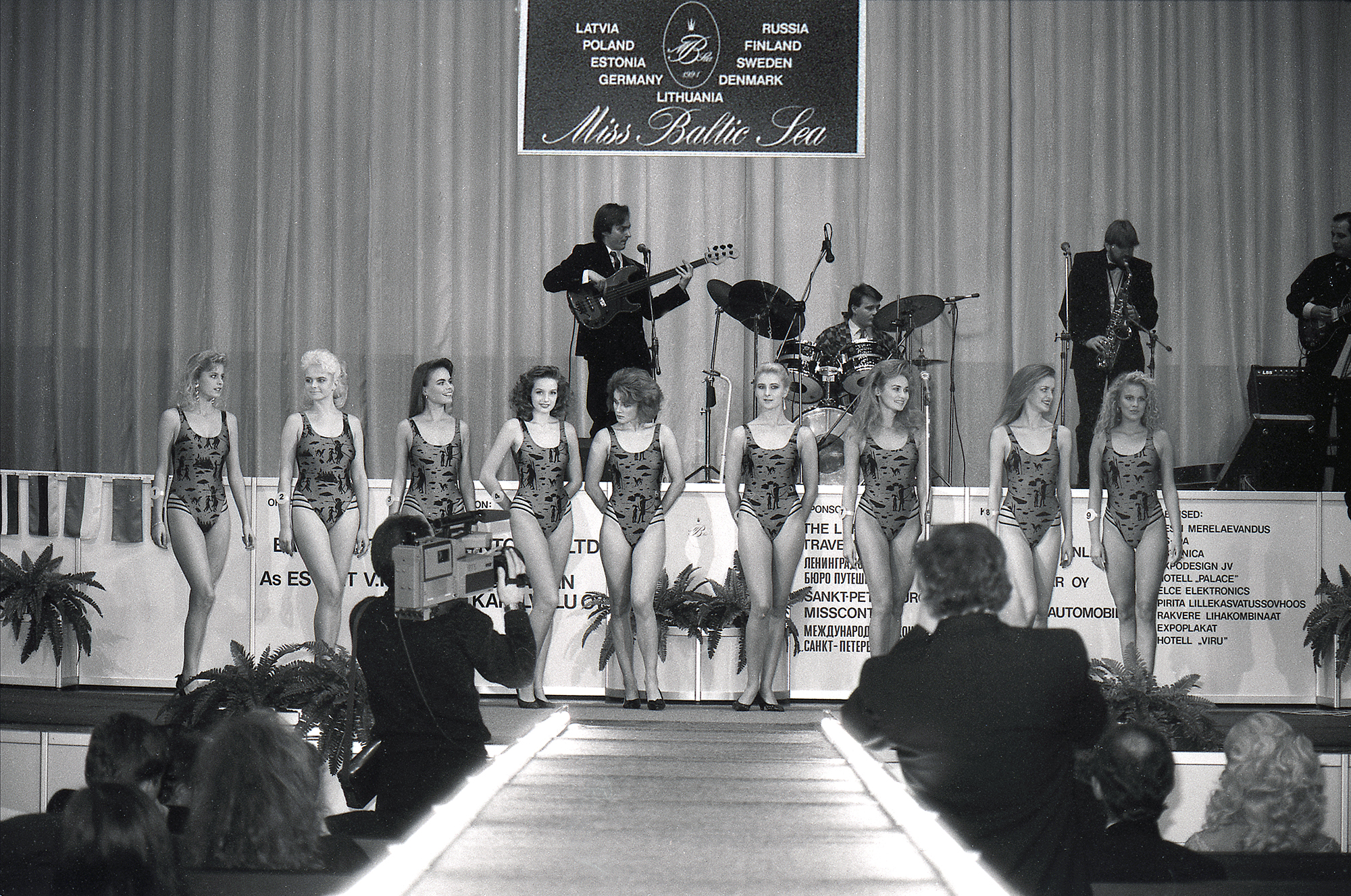 Miss Baltic Sea 91 Tallinnas